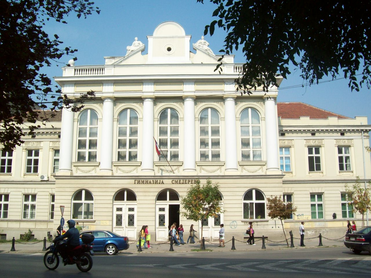 Gimnazija Smederevo